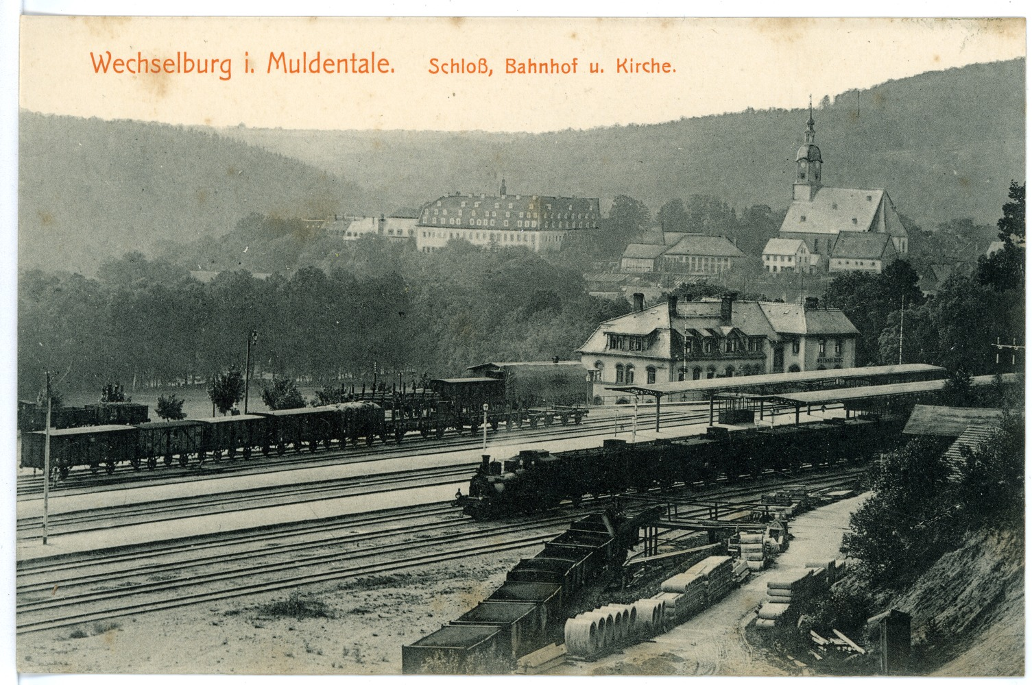 Wechselburg; Schloß und Kirche - Bahnhof mit Eisenbahn This postcard is from publisher Brück & Sohn in Meißen ( postcard has a unique number 15465 and is available in a higher resolution at the publisher. This images was uploaded in a cooperation project between Wikipedians and the publisher.